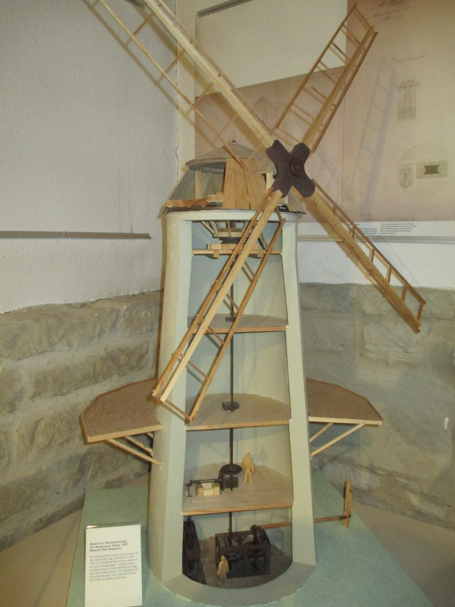 Modell einer Windmühle, wie sie zur Soleörderung in Bad Rappenau benutzt wurde. Städtisches "Museum im Fränkischen Hof"